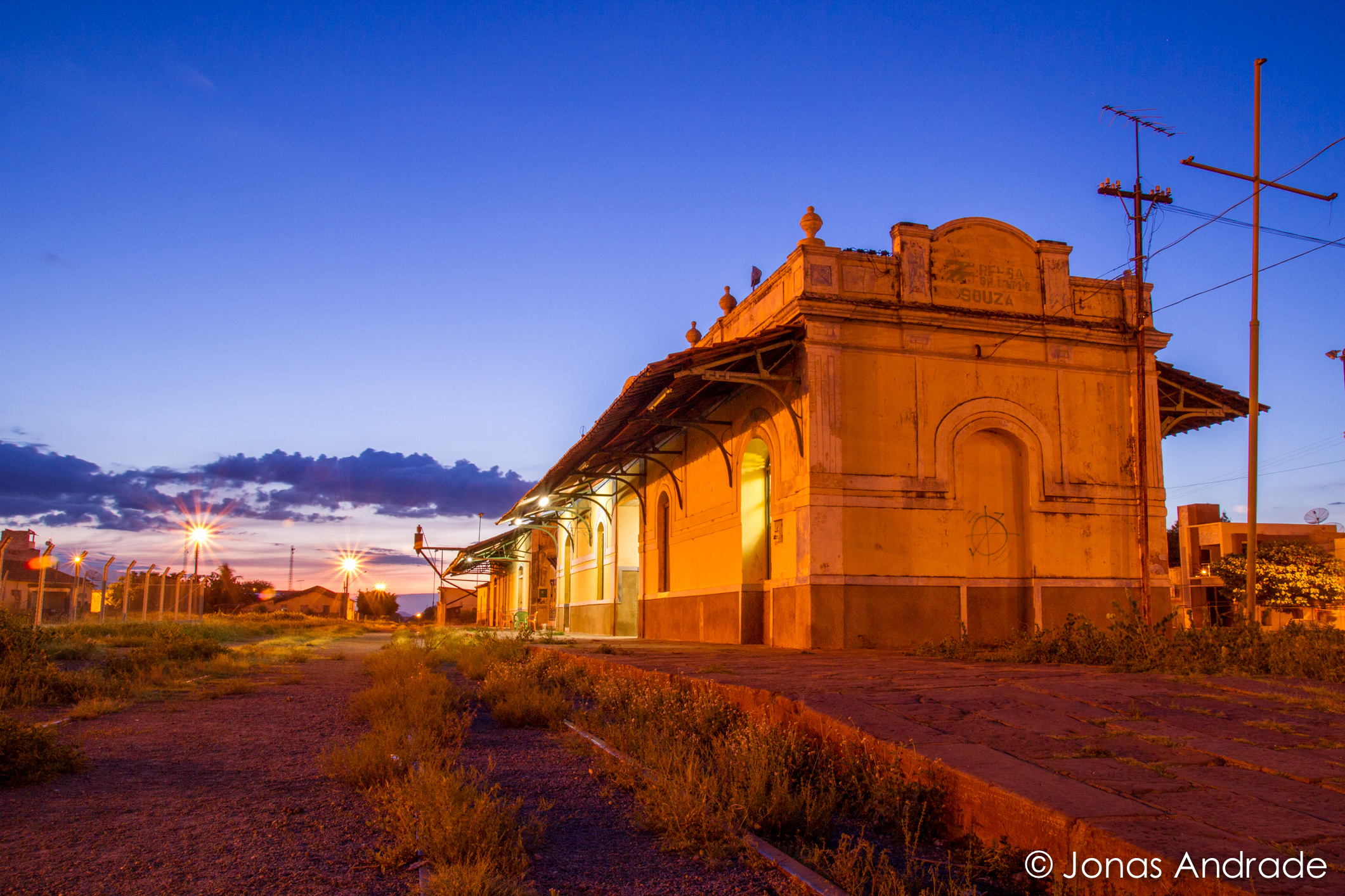 Estação ferroviária abandonada na cidade de Sousa, Paraíba, Brasil